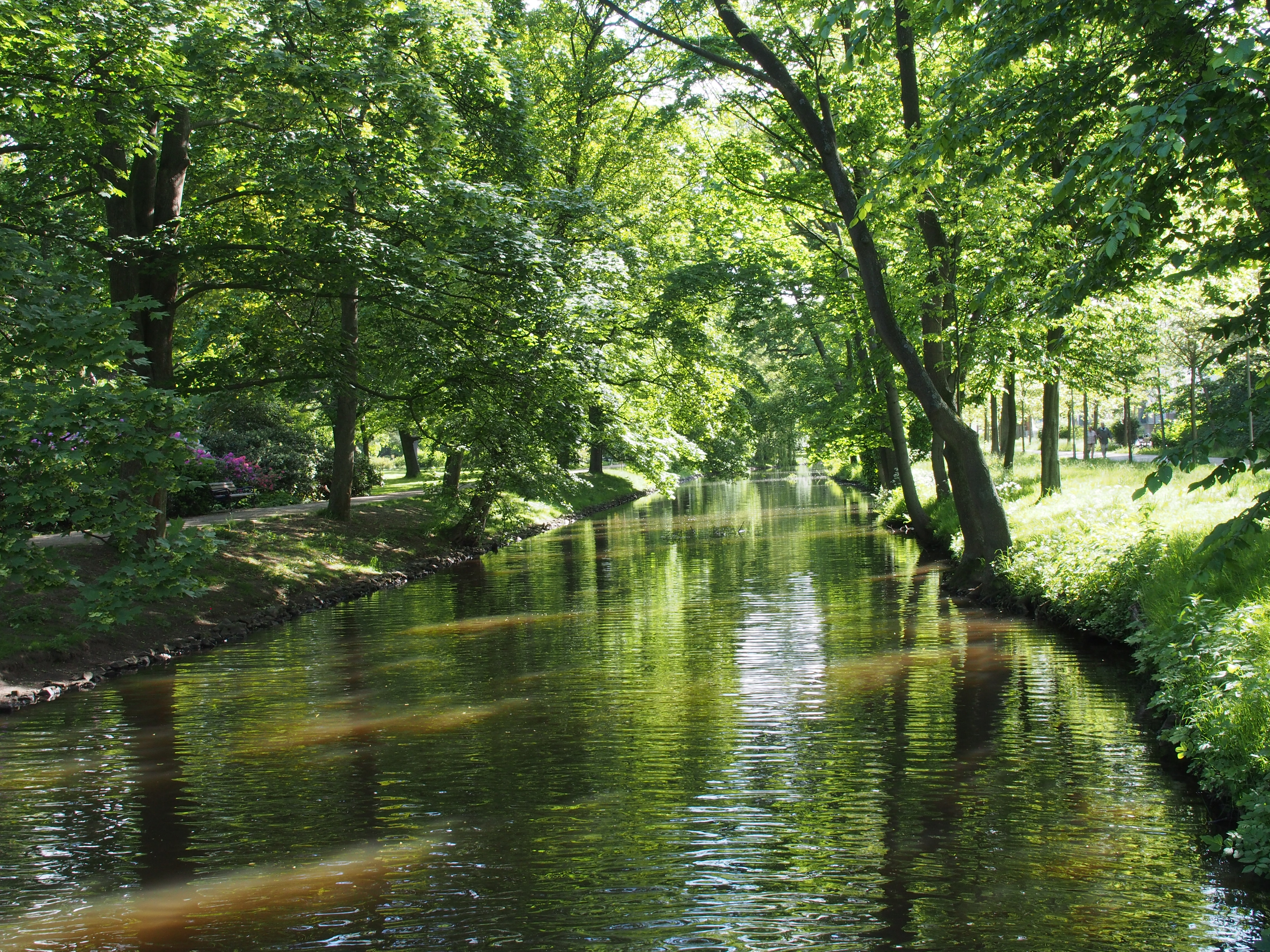 Magnusgraben im Französischen Garten in Celle (Niedersachsen)